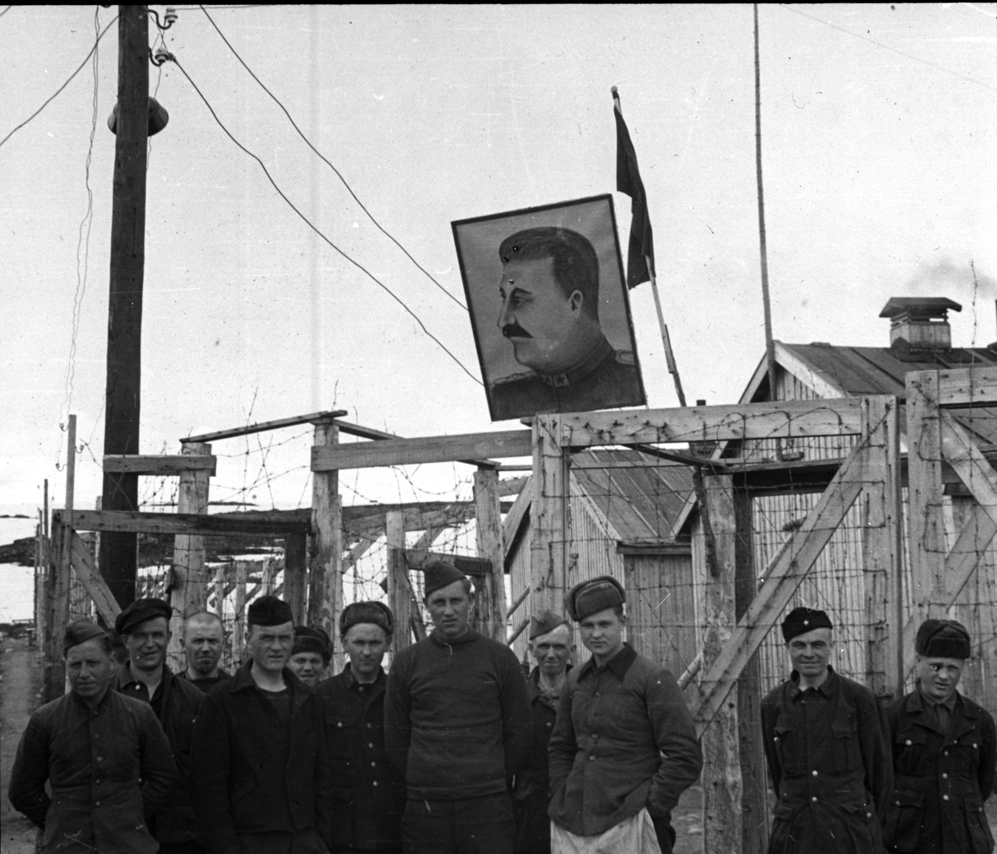 Bildet er hentet fra Arkivverket. Bildetekst: "Den røde fane og Stalins bilde, symbolet på det russiske samfunn i dag, kom opp i løpet av de første dagene." Foto tatt i forbindelse med frigjøringen av russiske krigsfanger i Nordland, 1945. Arkivinstitusjon : Riksarkivet Arkivnavn : Kreyberg, Leiv Sted : NORGE, 00 Ukjent, 00 Ukjent, Emneord: Andre verdenskrig, Krig, Frigjøring Avbildet